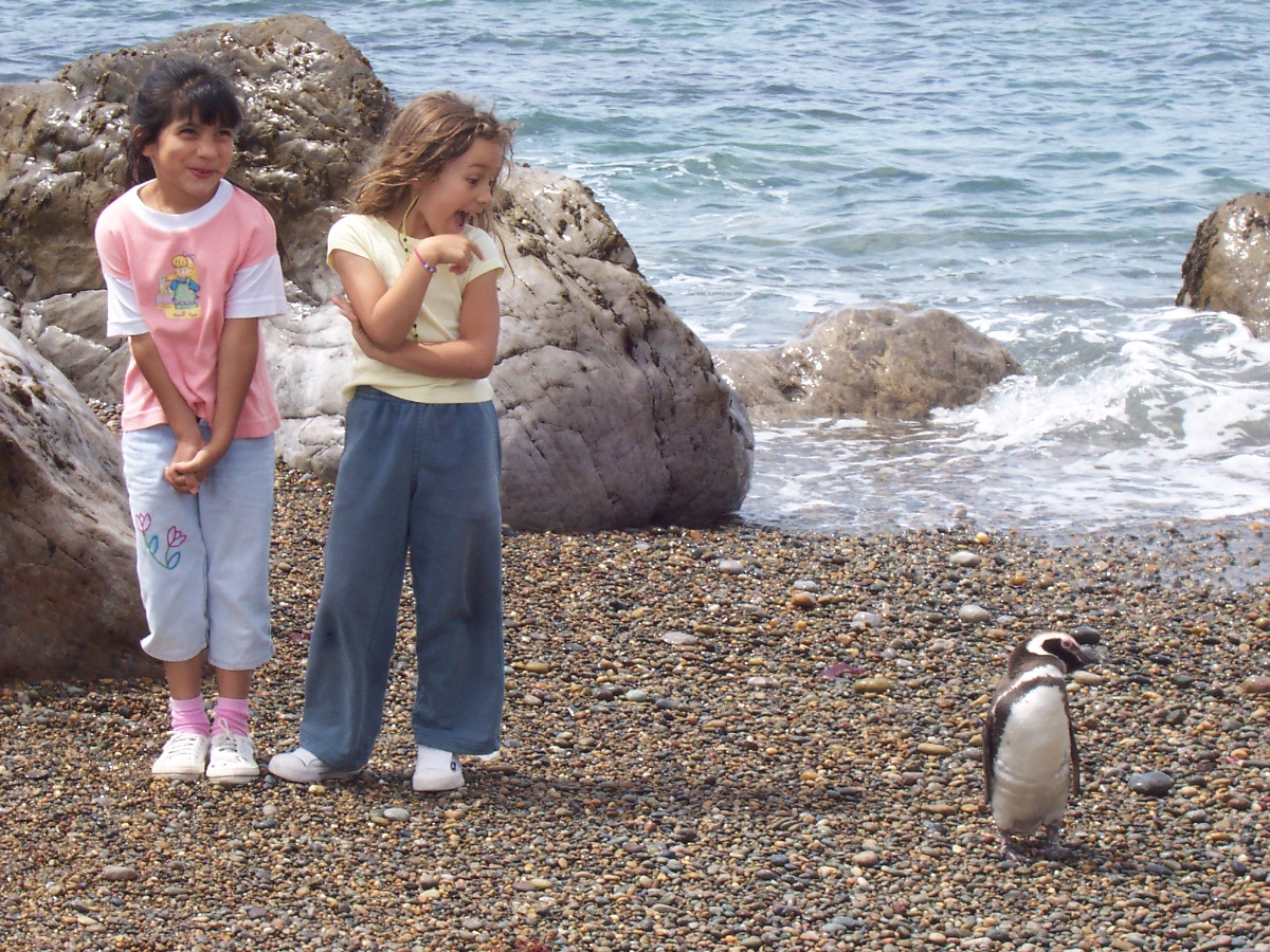 pengüin